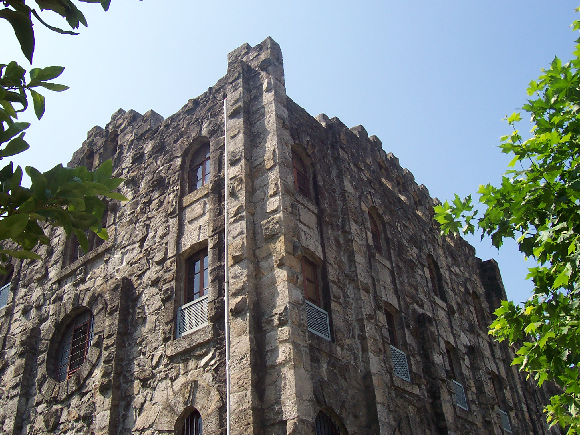 Mosteiro da Visitación, Salesas Reais, Vigo, 1942, Antonio Palacios